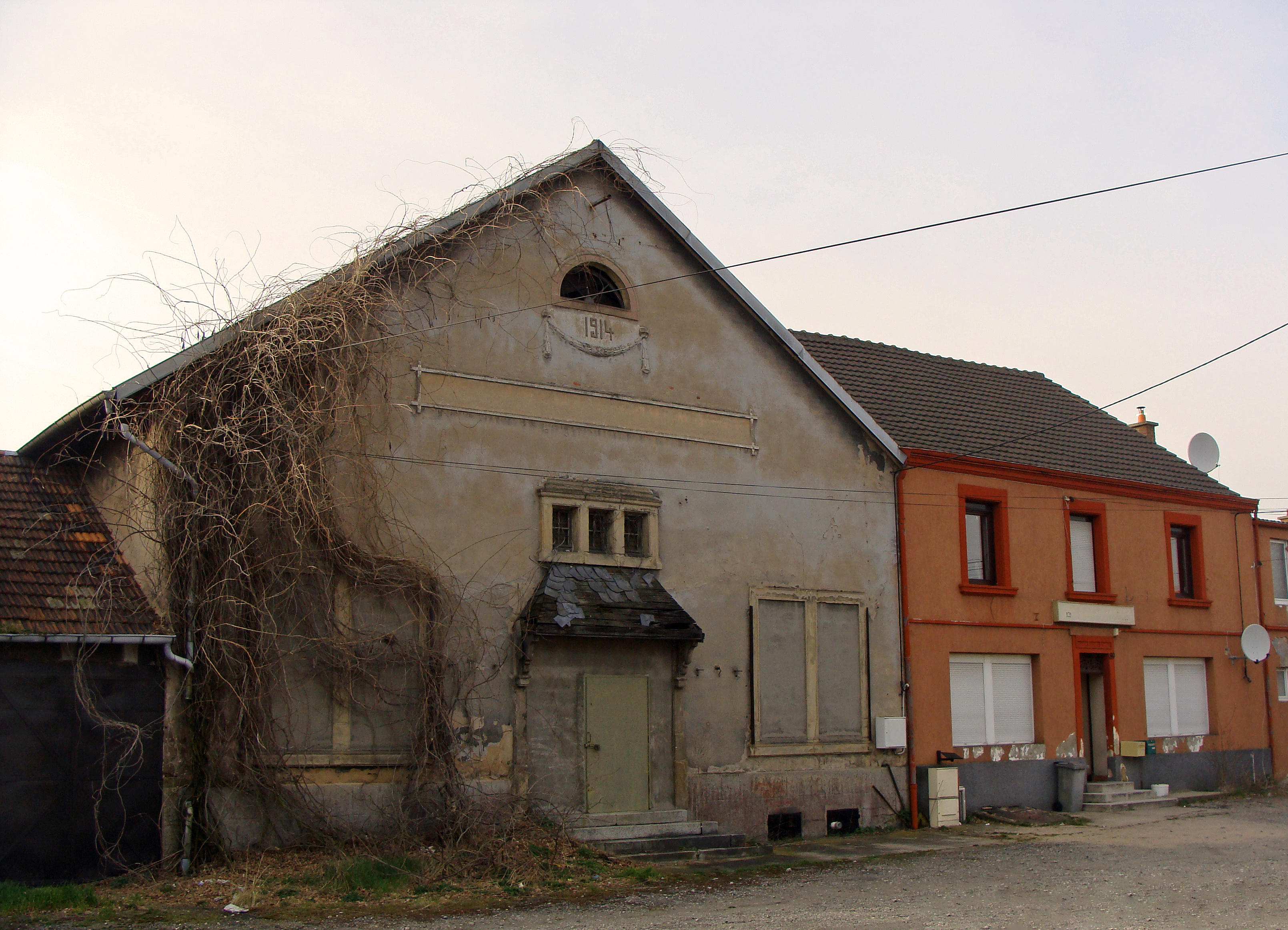 Ancien casino de la mine, ville de L'Hôpital (Moselle). Construit en 1914. Photographie prise le 7 mars 2014.